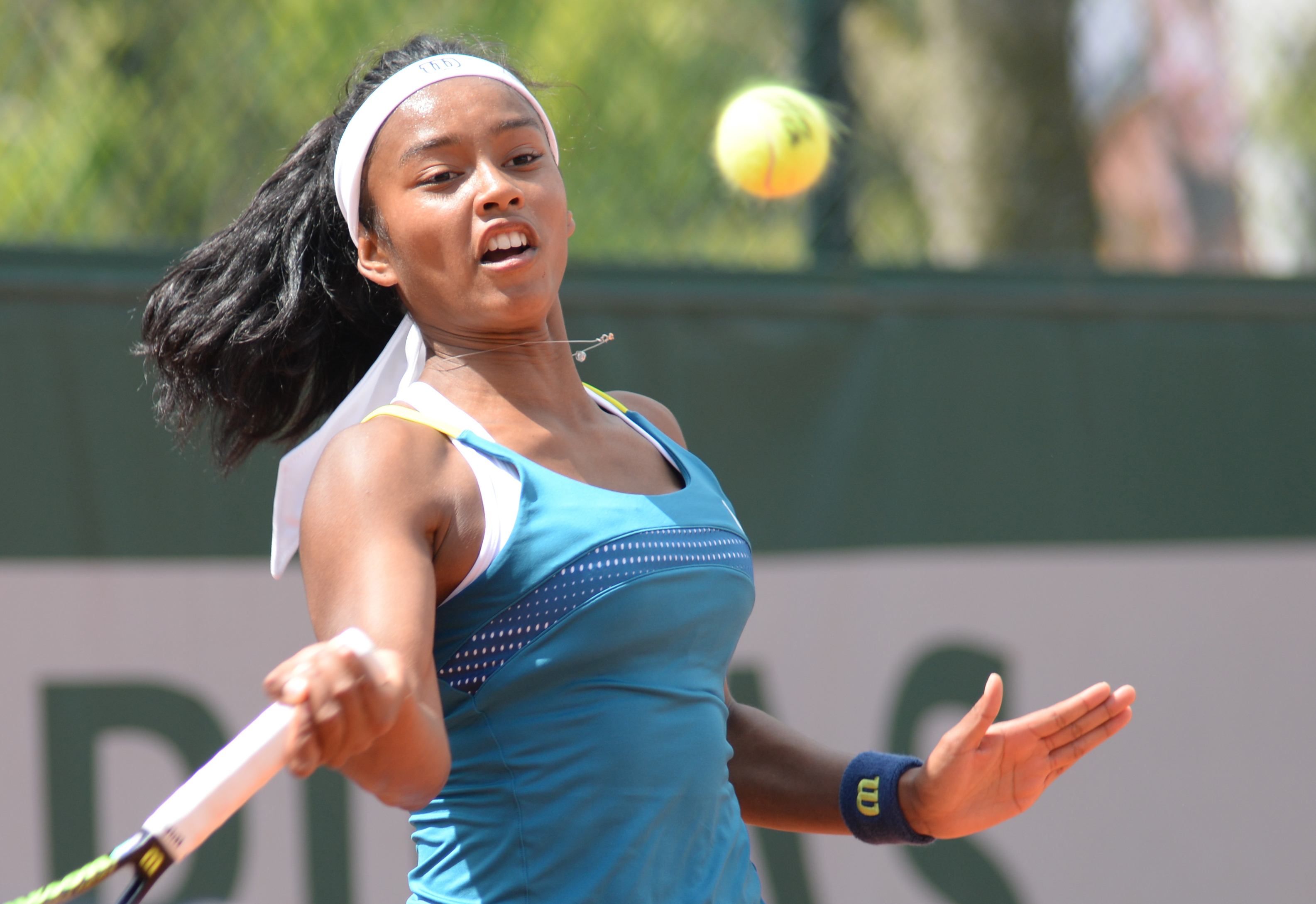 Tessah Adrianjafitrimo